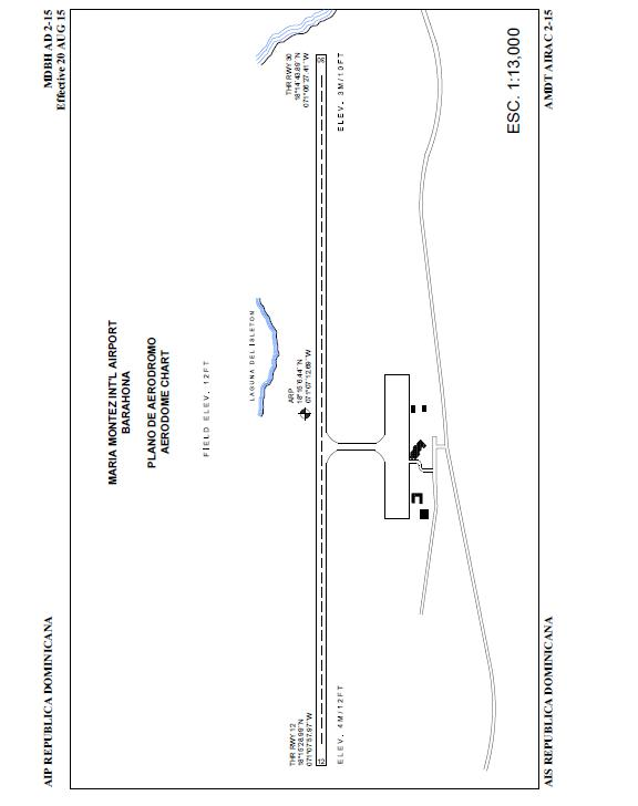 Plano de aerodromo